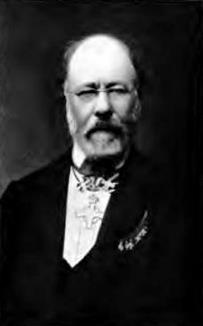 portrait photographique de M. Auguste-François Le Jolis